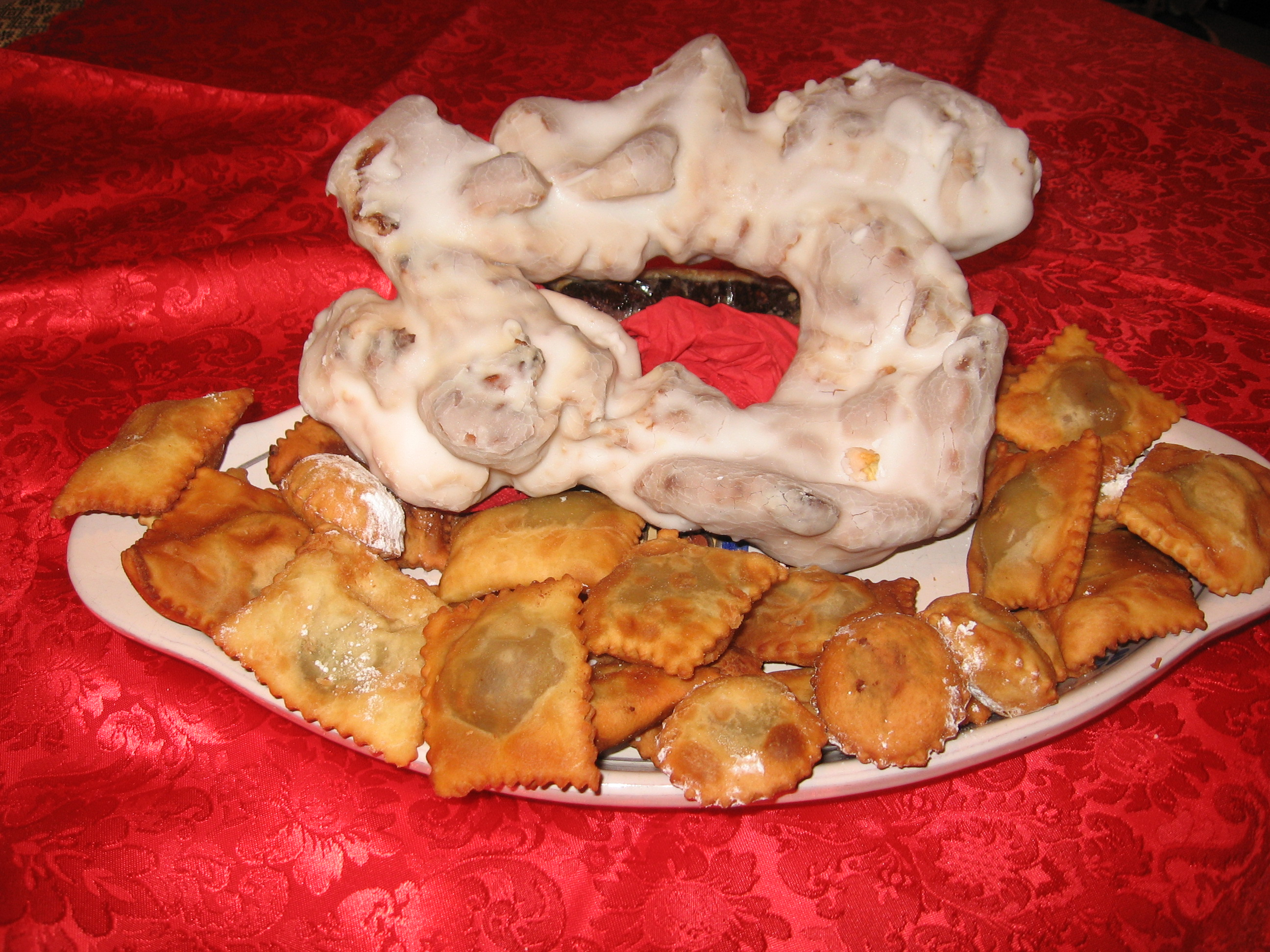 Dolci aviglianesi: tarallo e calzoncelli